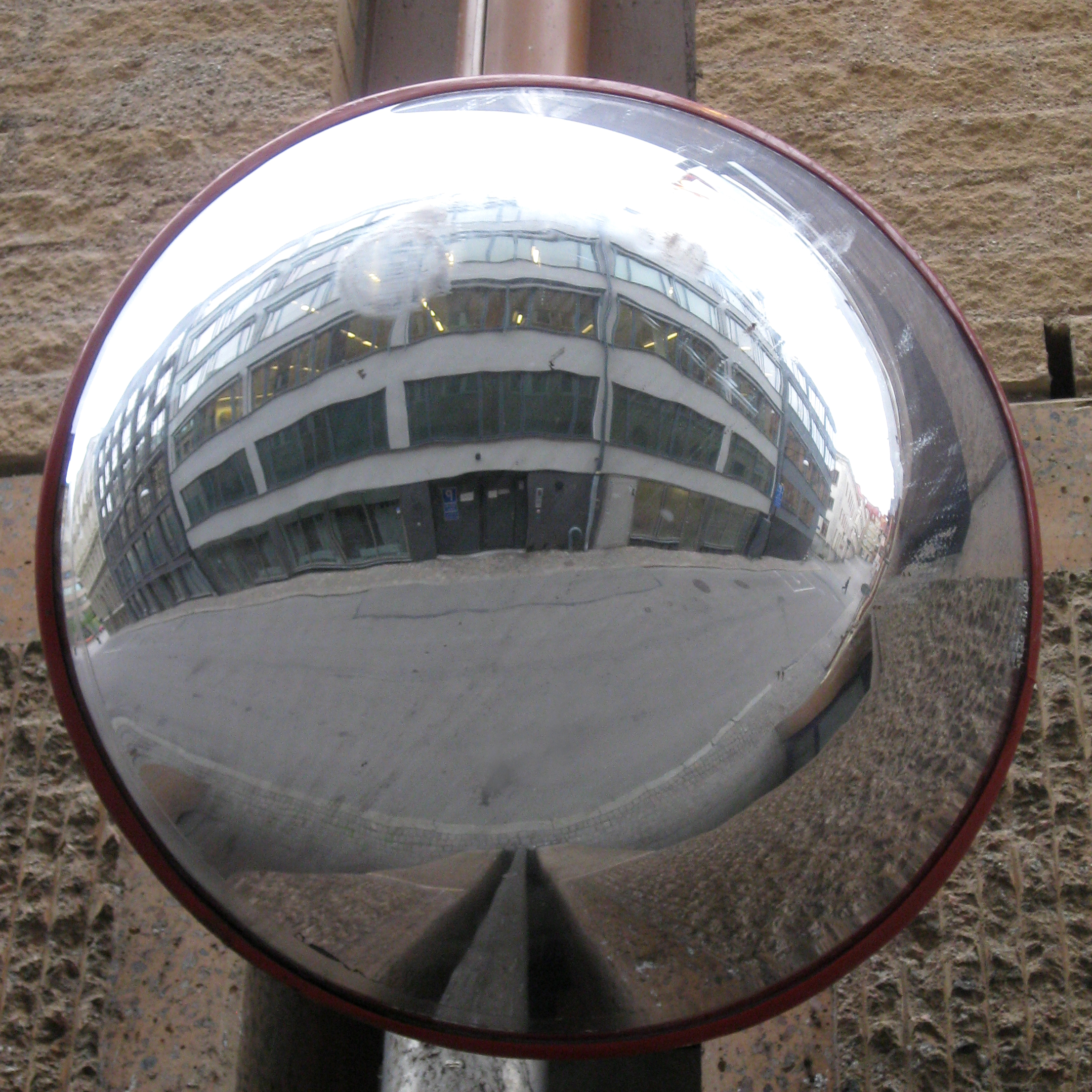 Bilden föreställer en trafikspegel på Klädpressaregatan i Göteborg.